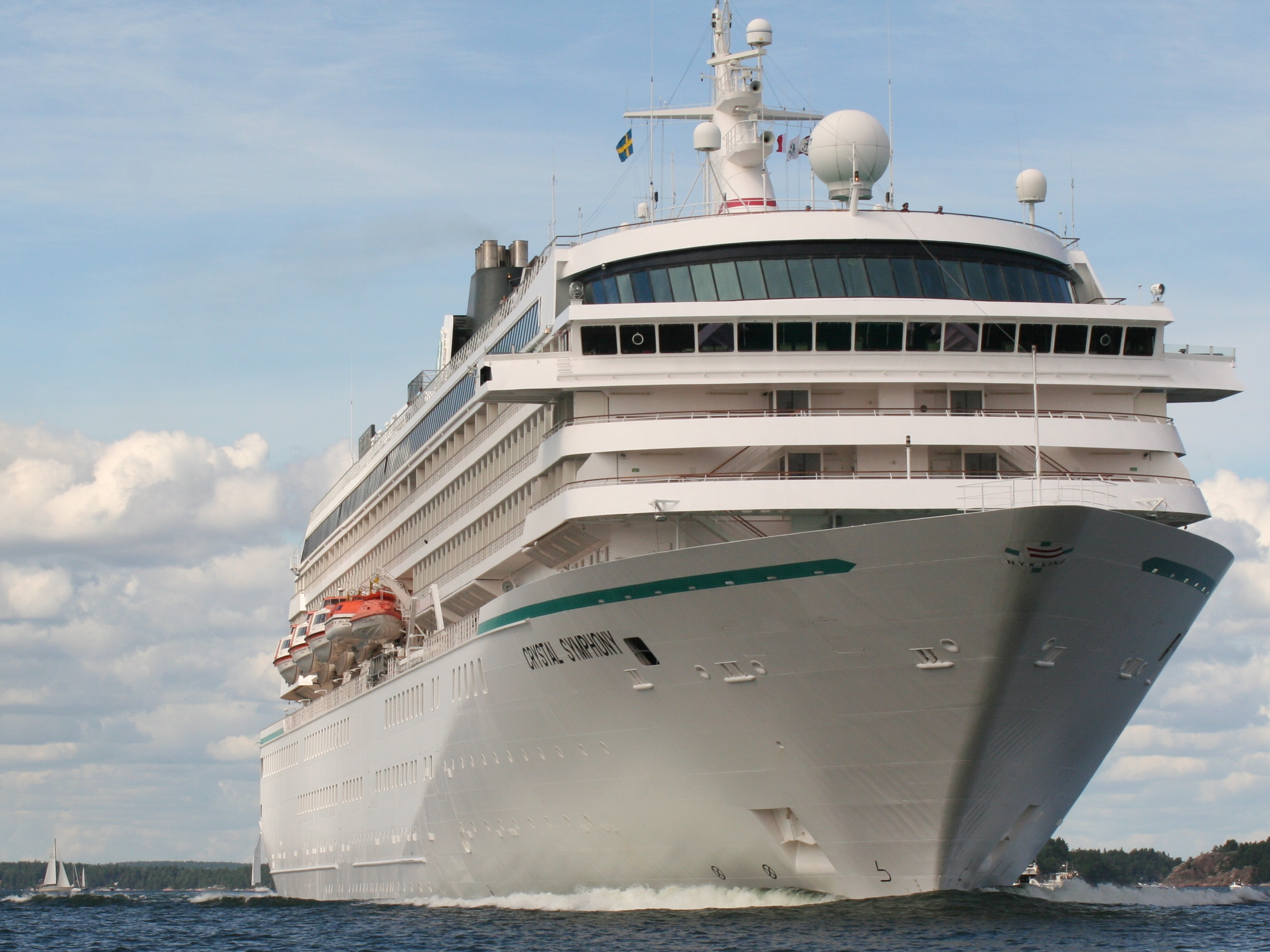 Kryssningsfartyget Crystal Symphony öster om Lillsved i Stockholms skärgård, på väg ifrån Stockholm. Källa: eget foto, fotograf EnDumEn 30 juli 2007